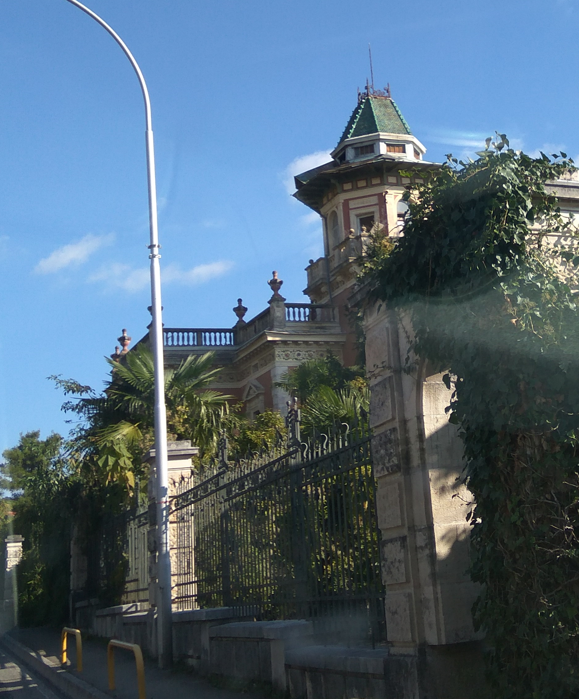 Villa Emma im Oktober 2016 vom Süden gesehen